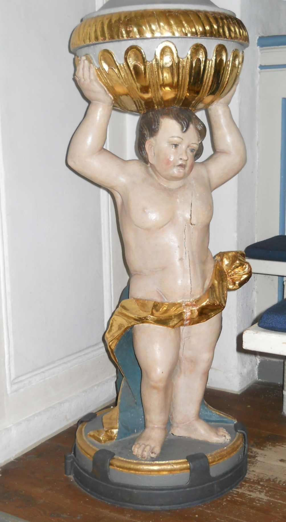 Barockes Taufbecken der Kirche St. Martin und Ägidius in Wald im Landkreis Weißenburg-Gunzenhausen, Bayern. Das Kunstwerk von unbekannter Hand entstand im 18. Jahrhundert.